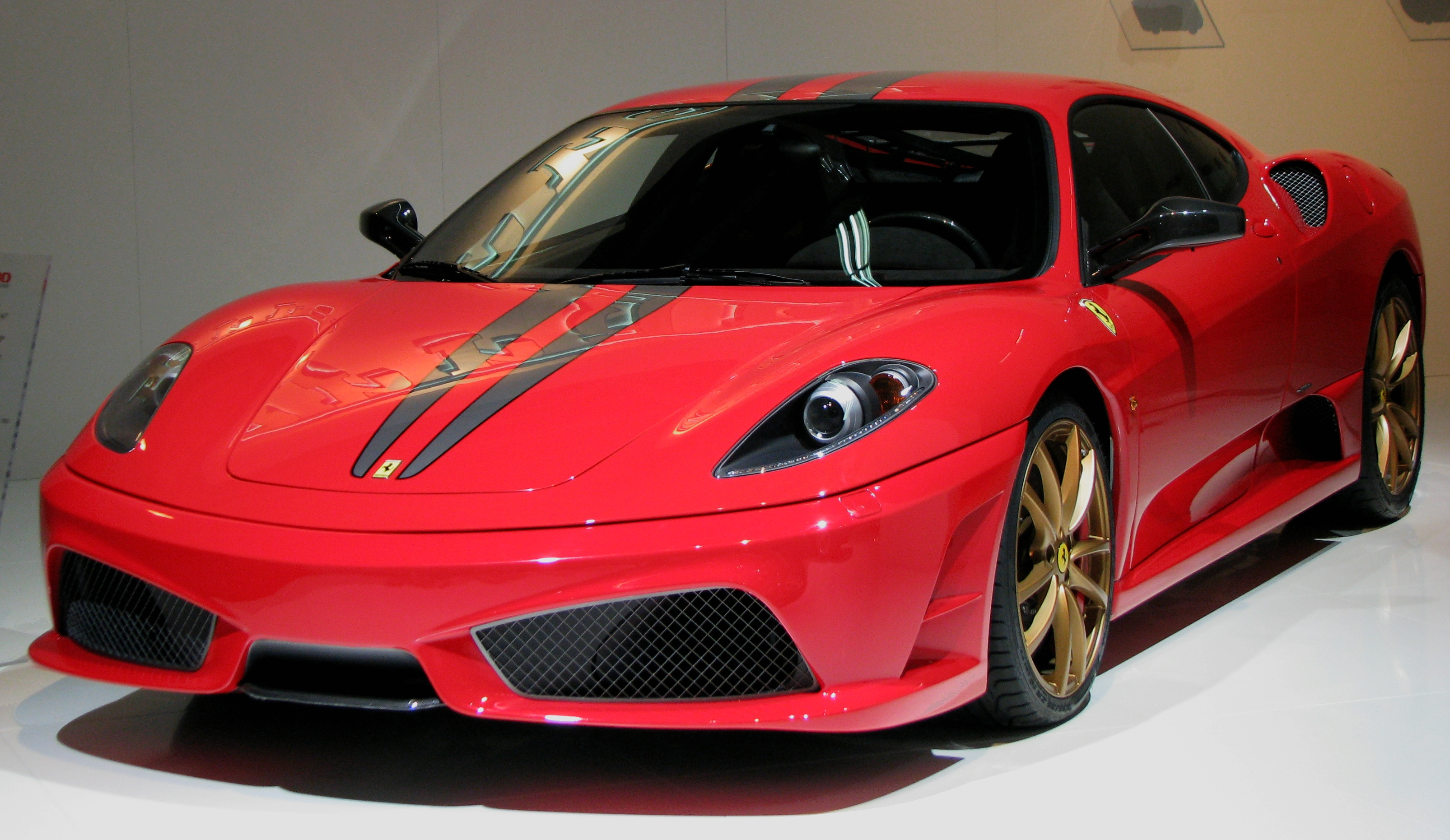 Ferrari F430 Scuderia en el Salón Internacional del Automóvil de Barcelona 2009.